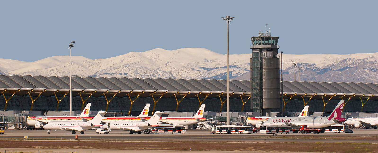 Terminal T-4 Madrid - Barajas Airport